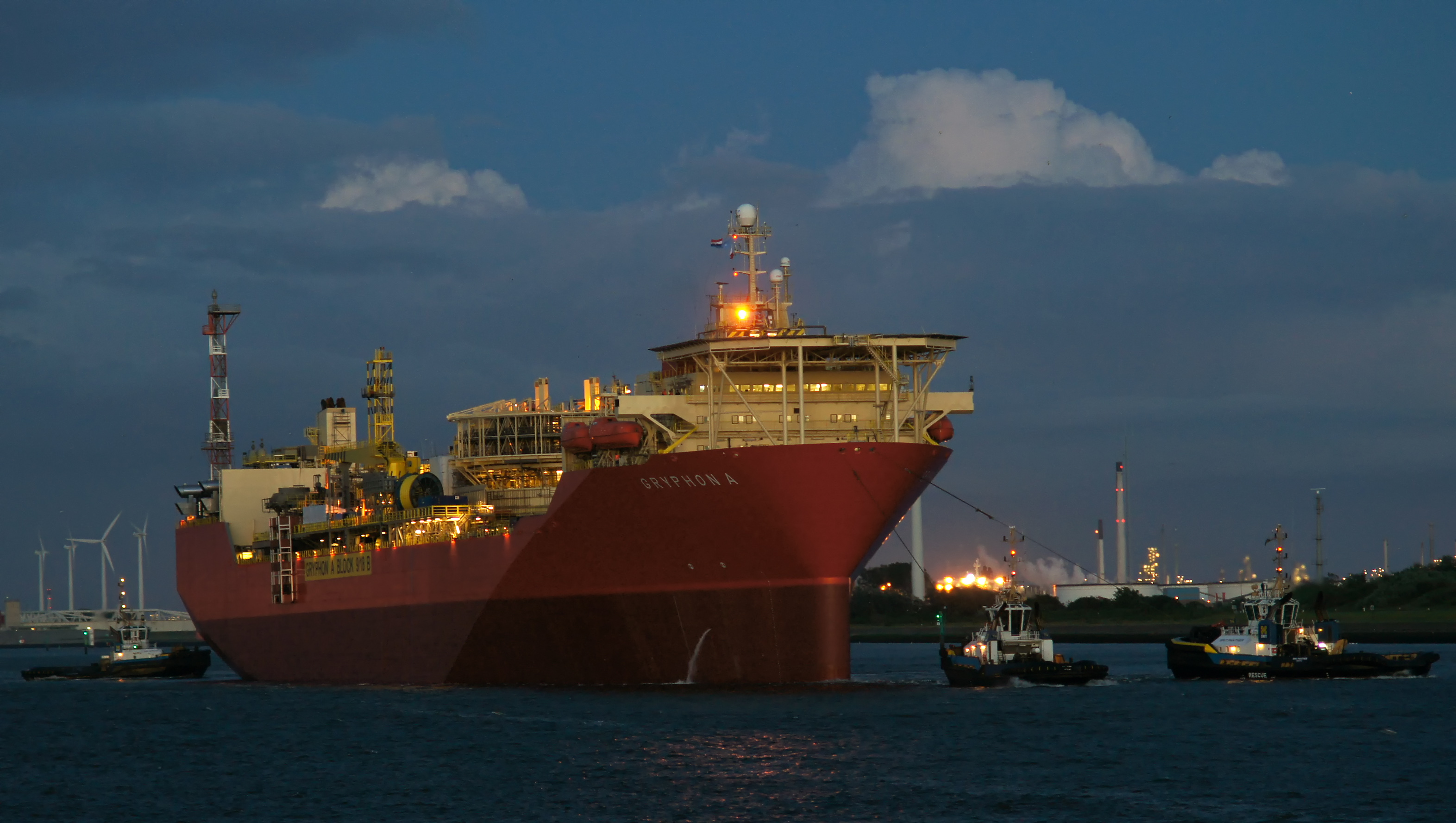 Nieuwe Waterweg 7-6-2012 . GRYPHON A werd verhaald door vier Smit sleepboten van Keppel in de Botlek naar het Calandkanaal in Europoort